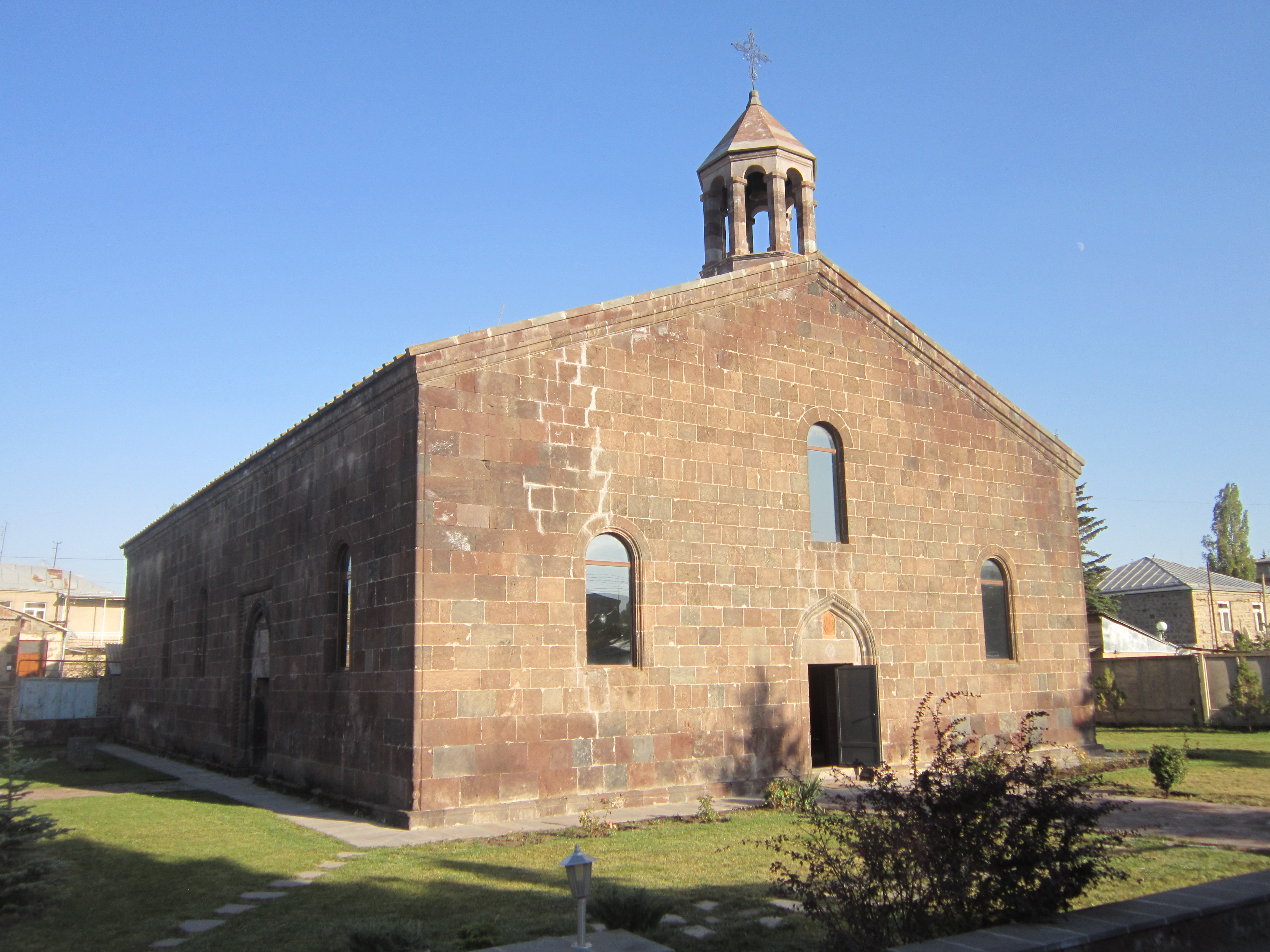 Եկեղեցի Սբ. Հովհաննես Մկրտիչ ( Սբ. Կարապետ ) 1/21